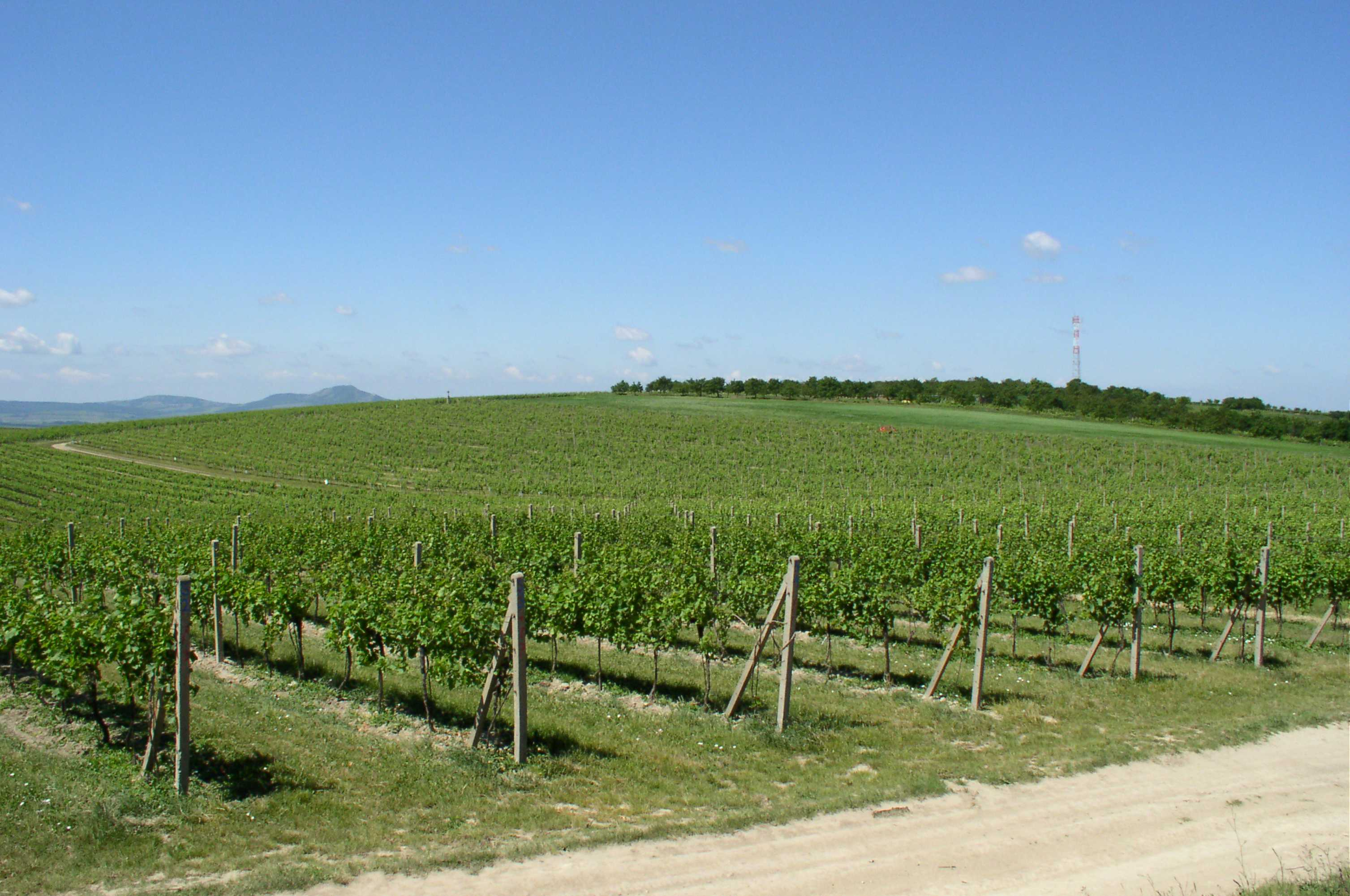 podhled od kaple sv. Antoníčka na vinice Nové hory před výstavbou RD